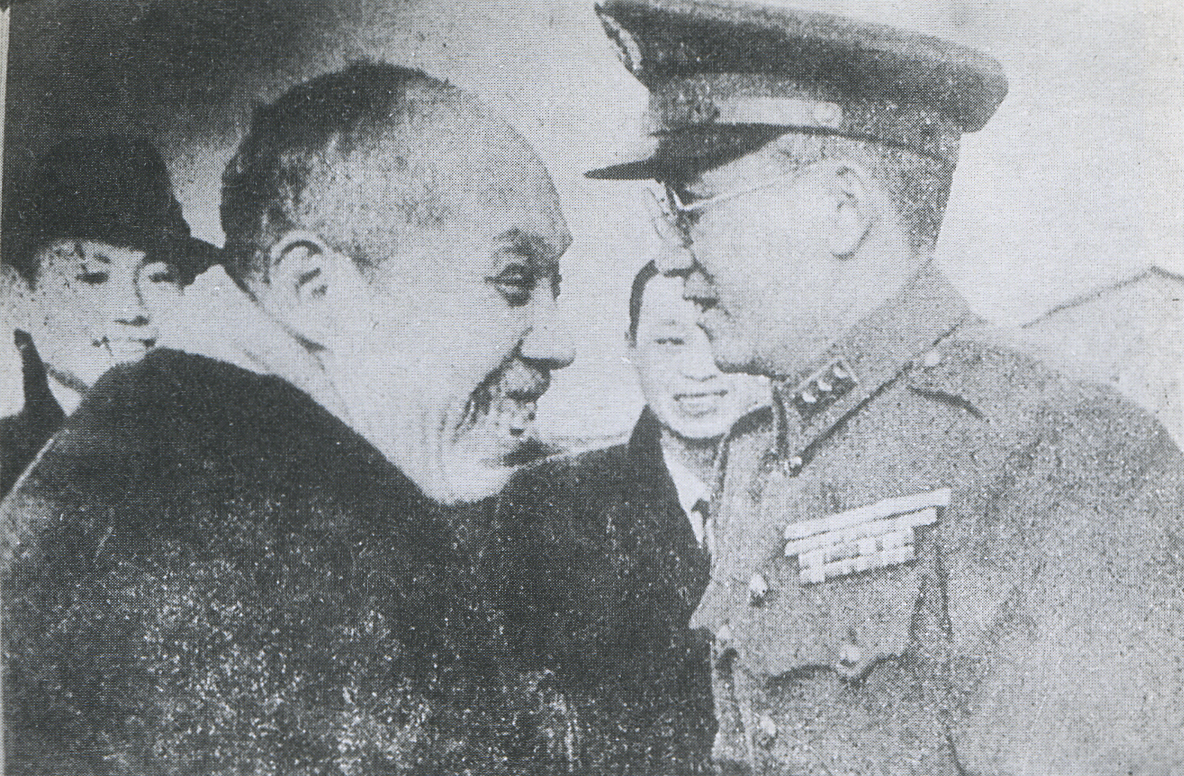 1947年3月7日，国民政府代表张治中（右）在南京送别董必武（左）等中共驻京人员。中共驻京人员由马歇尔安排，搭乘专机撤回延安。